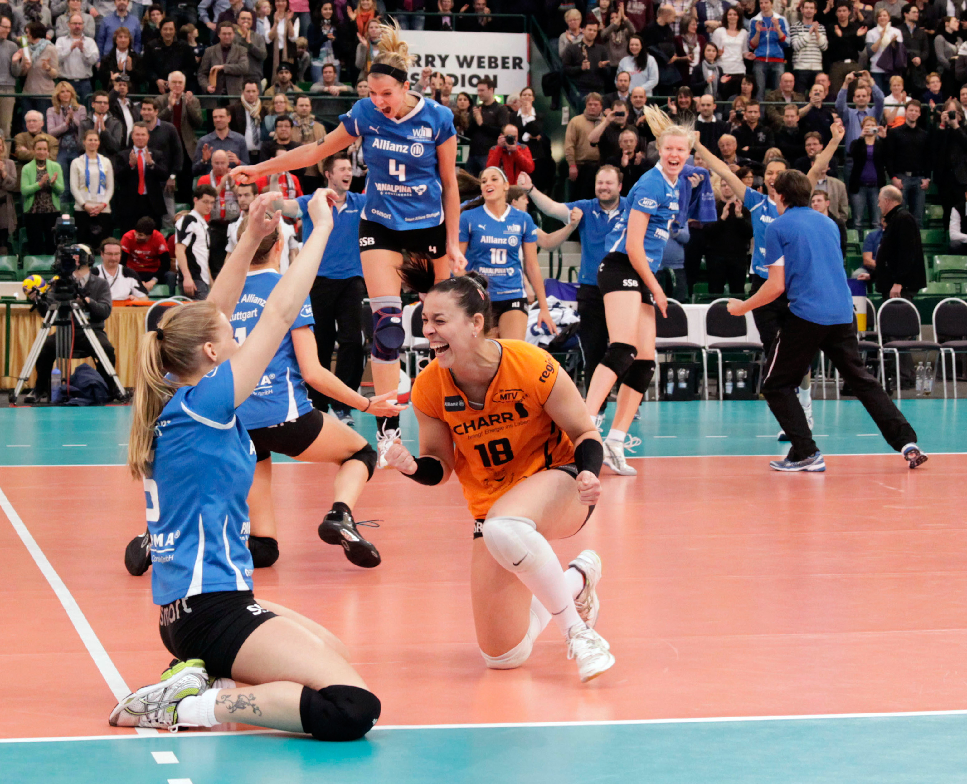 Die Spielerinnen von Smart Allianz Stuttgart wenige Sekunden nach dem Pokaltriumpf gegen den VfB 91 Suhl im Gerry Weber Stadion, Halle-Westfalen